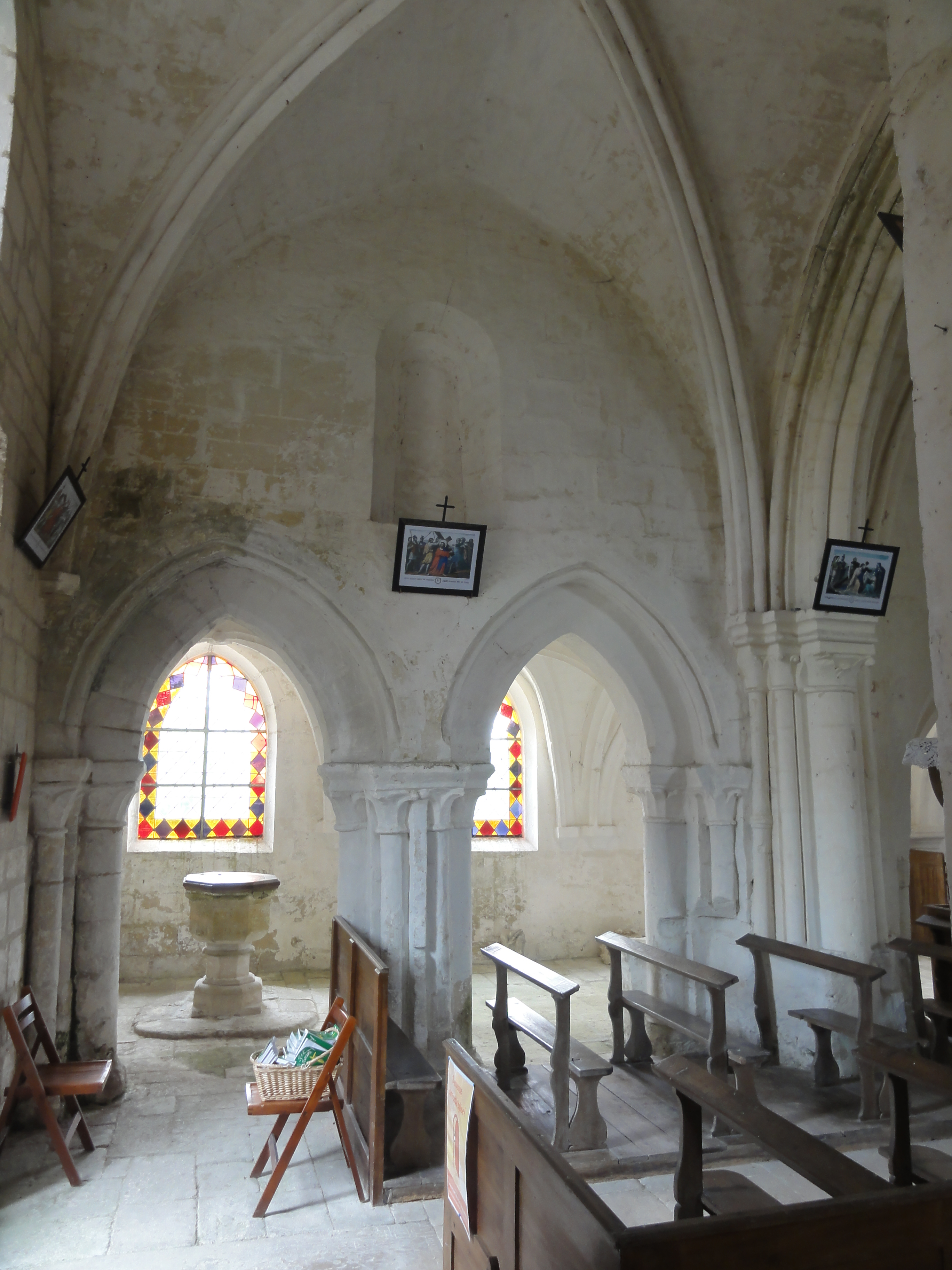 Intérieur de l'église (voir titre).